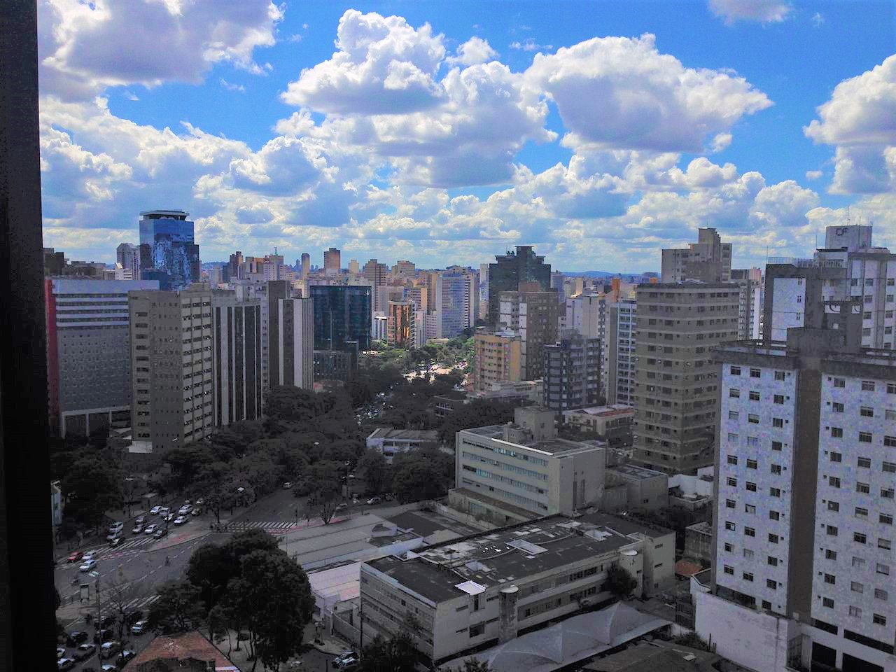 Foto tirada de um Predio em Belo Horizonte